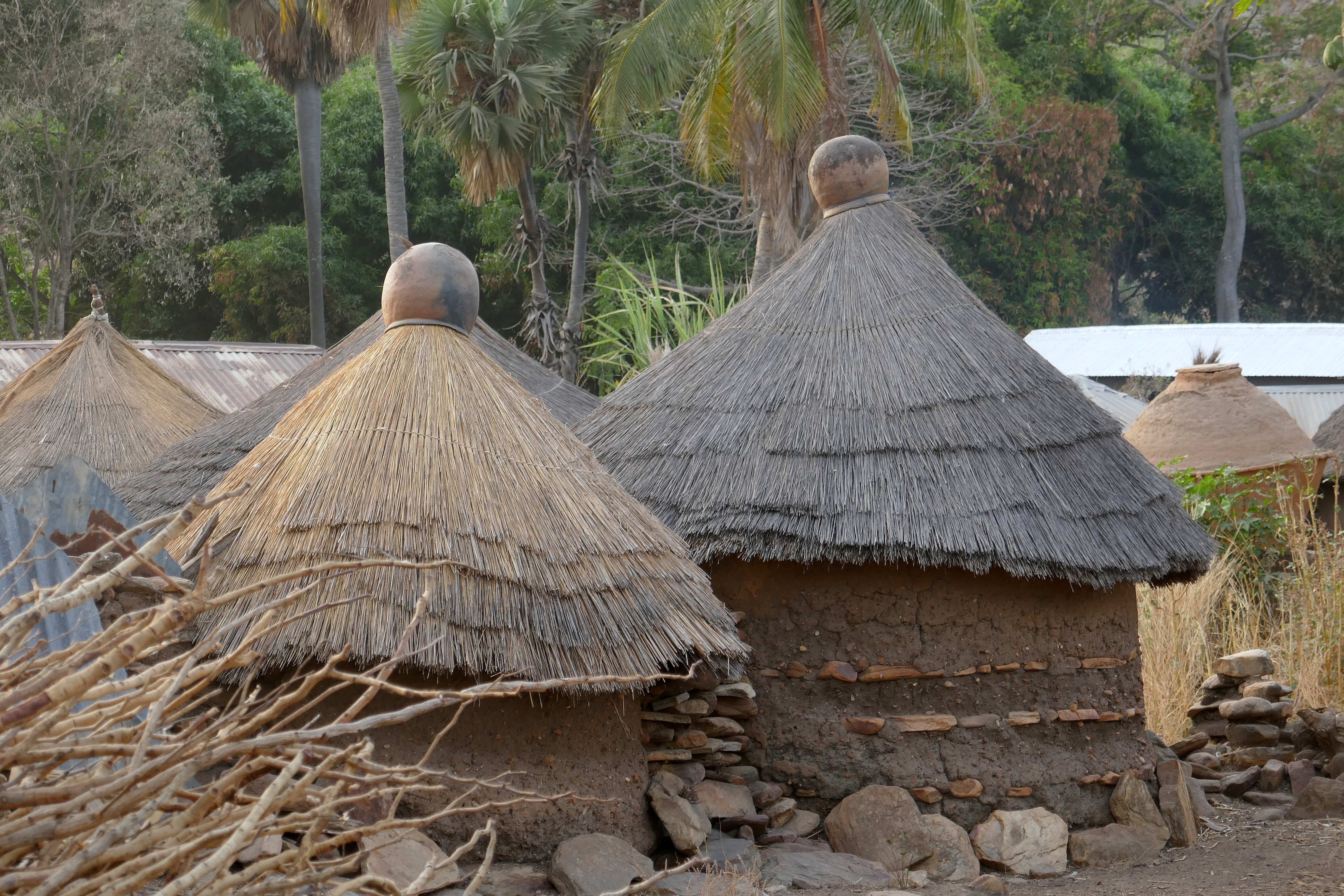 Toits de Tanéka-Béri (Bénin).